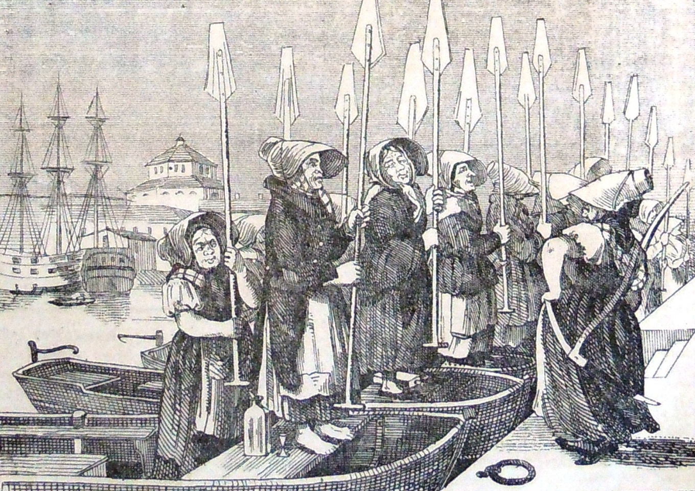 Roddarmadamerna i Stockholm rusta sig till krig – mot vefsluparna. Teckning i Illustrerad Tidning, nr 3 den 20 januari 1855. Bildkonst Roddarmadamerna och dalkullorna med sina vevslupar konkurrerade om att frakta människor över Stockholms vatten. Illustrerad Tidning var ett veckomagasin med kulturell profil som kom ut i Stockholm 1855-1867. Tidningen introducerade på allvar den litografiska reportagebilden i svensk press. Tidningen finns i Kungliga Bibliotekets samlingar. Plats: Stockholm. Tid: 1855 Referenser Upphov: Okänd. Tid: 20 januari 1855 Utgiven av: J.F. Meyer & Komp